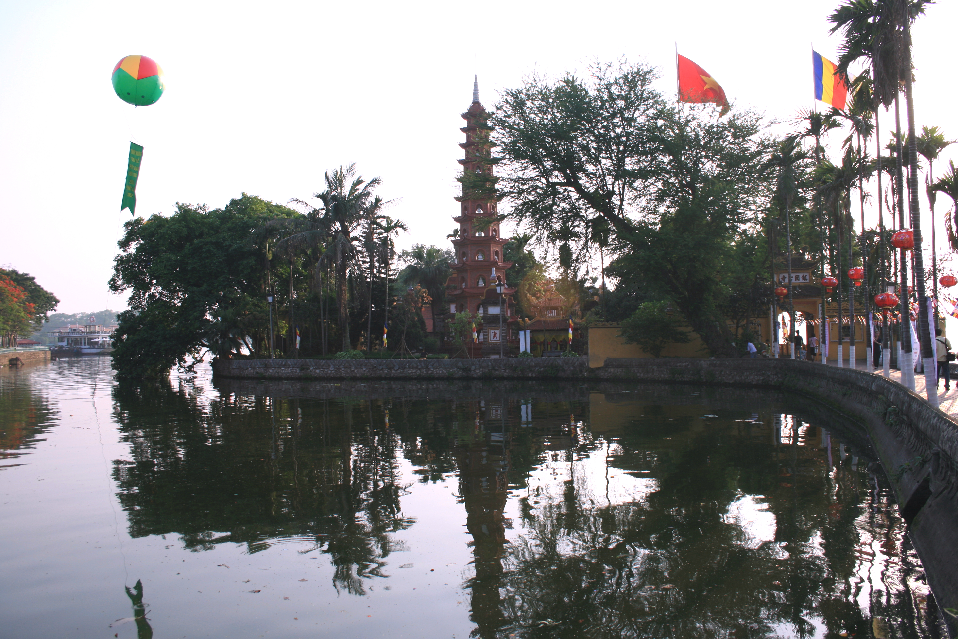 Chùa Trấn Quốc, Hà Nội, Việt Nam.